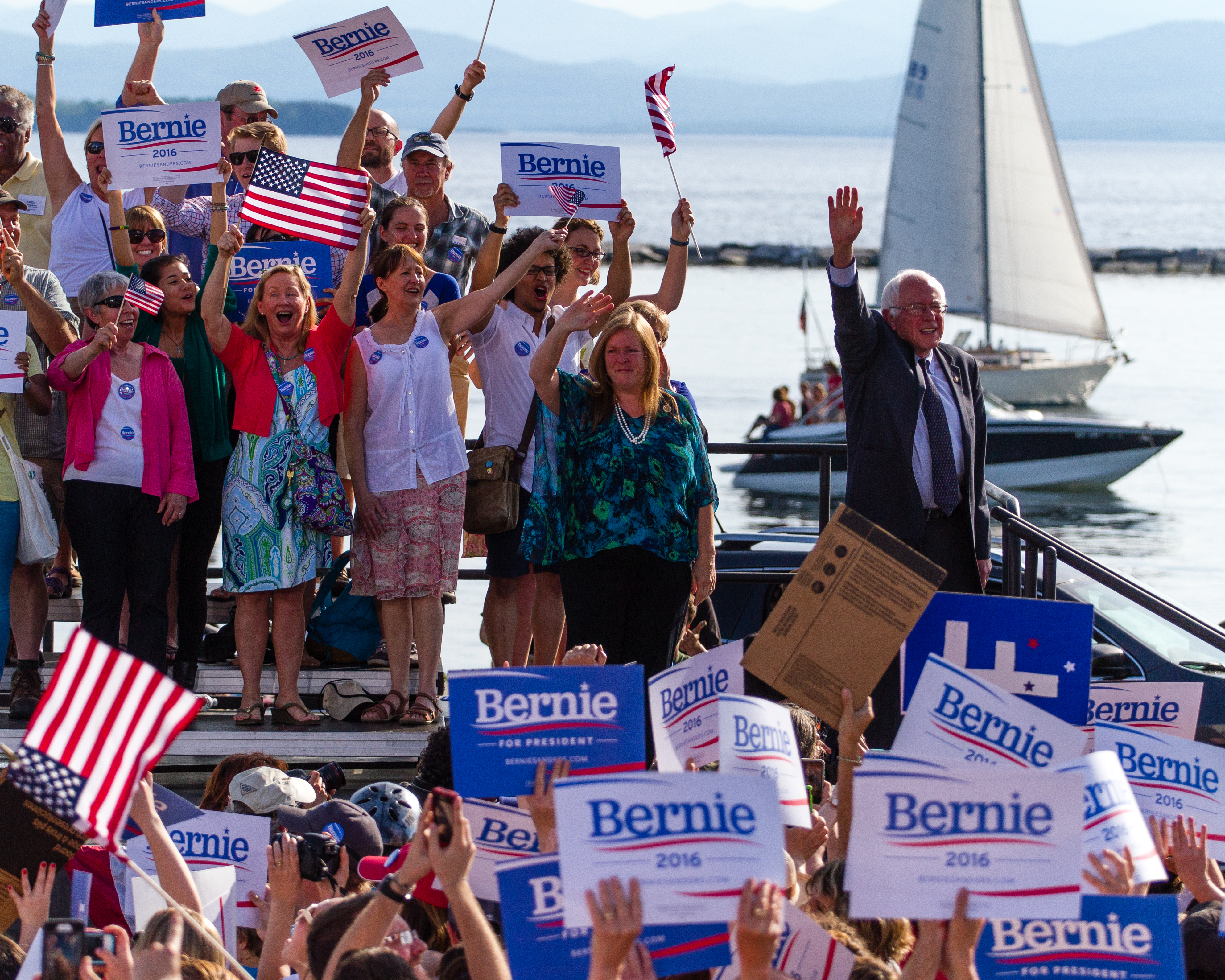 Bernie Sanders